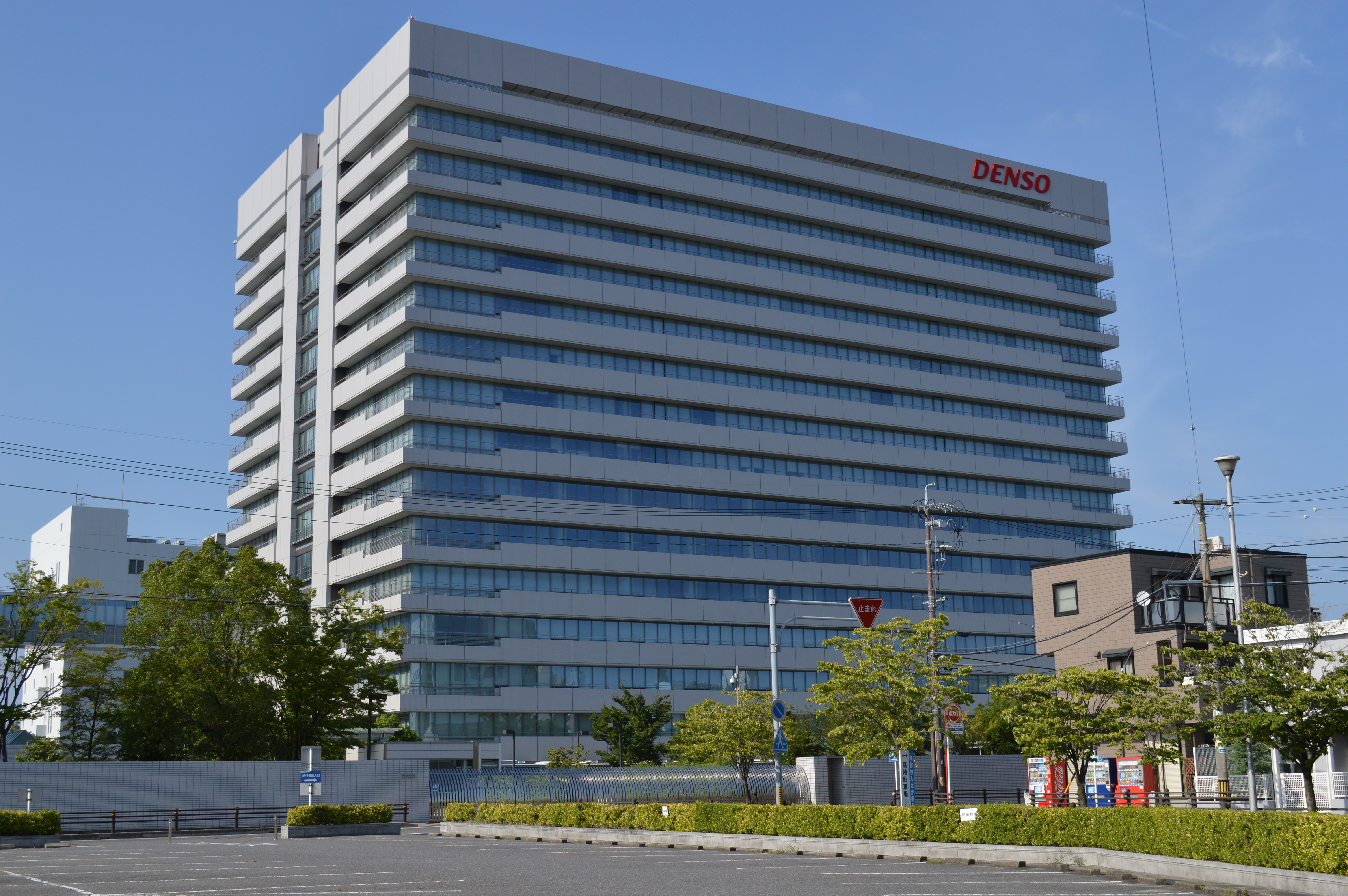 愛知県刈谷市にあるデンソー本社ビル